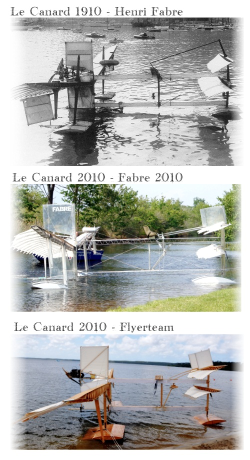 Les 3 canards Fabre - L'original (1910), la réplique moderne et la réplique en pin (2010)